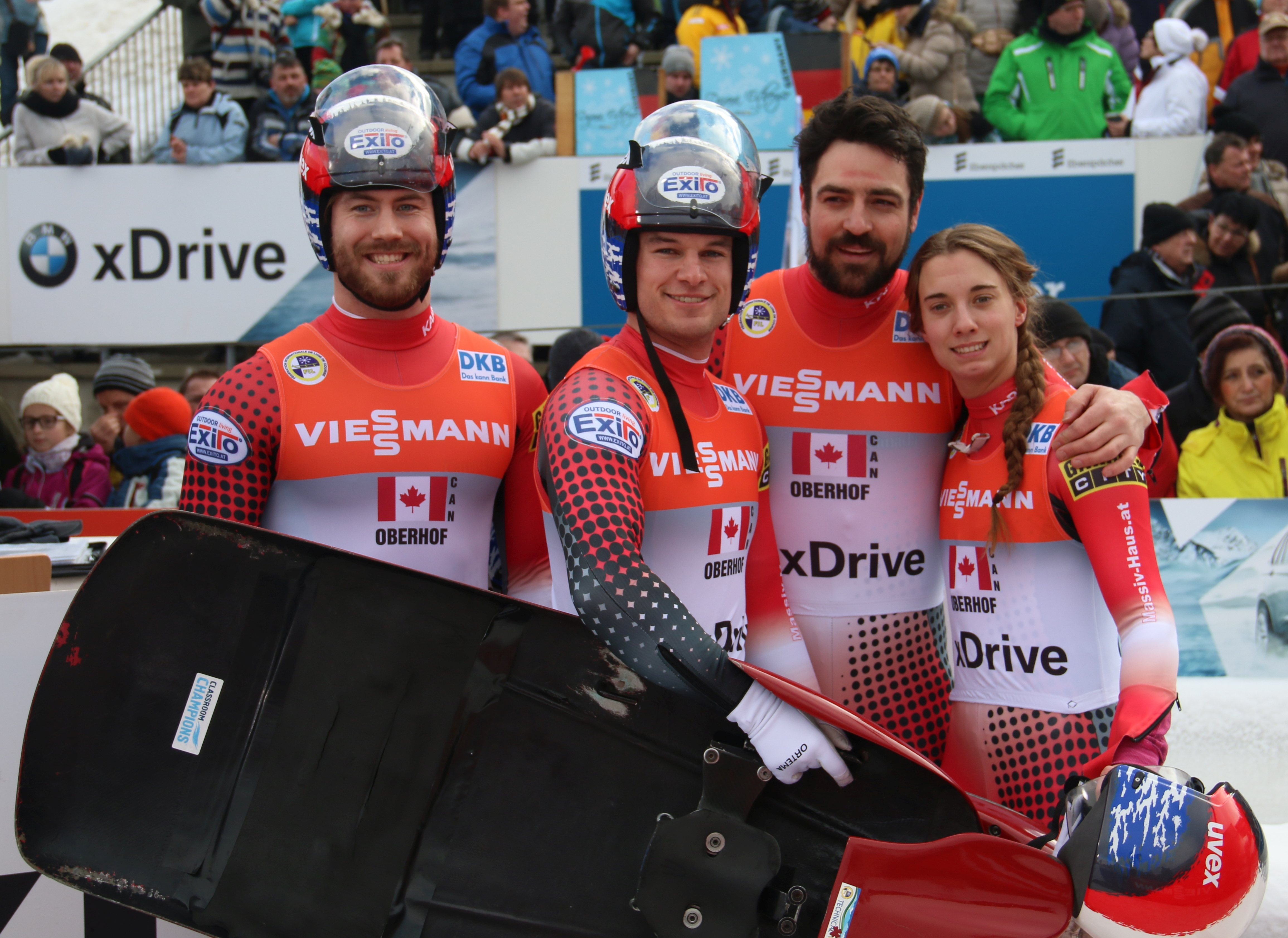 Teamstaffel Kanada (Kimberley McRae, Samuel Edney, Tristan Walker/Justin Snith) beim Rennrodel-Weltcup 2017 in Oberhof